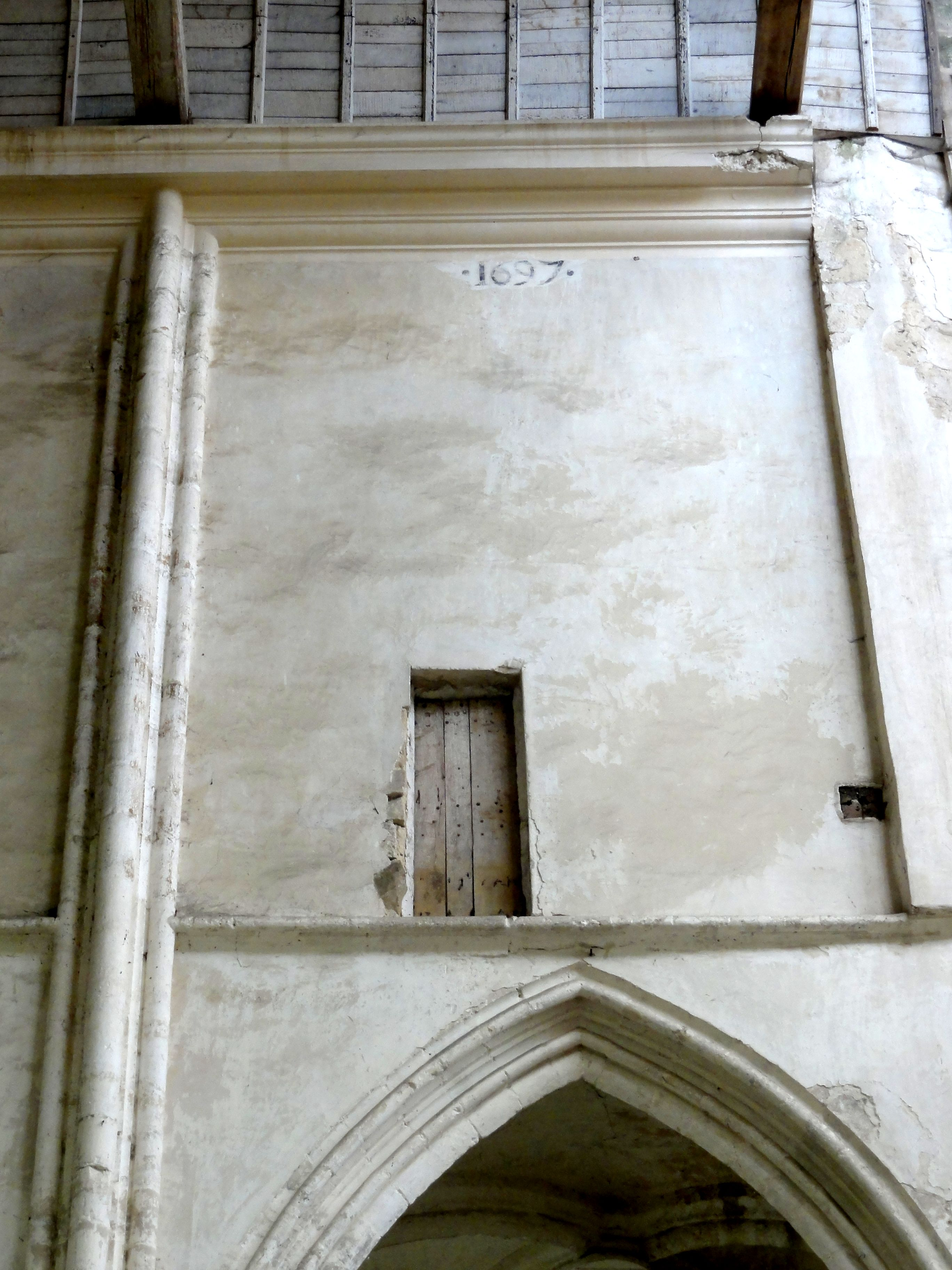 Quatrième travée de la nef, côté nord.